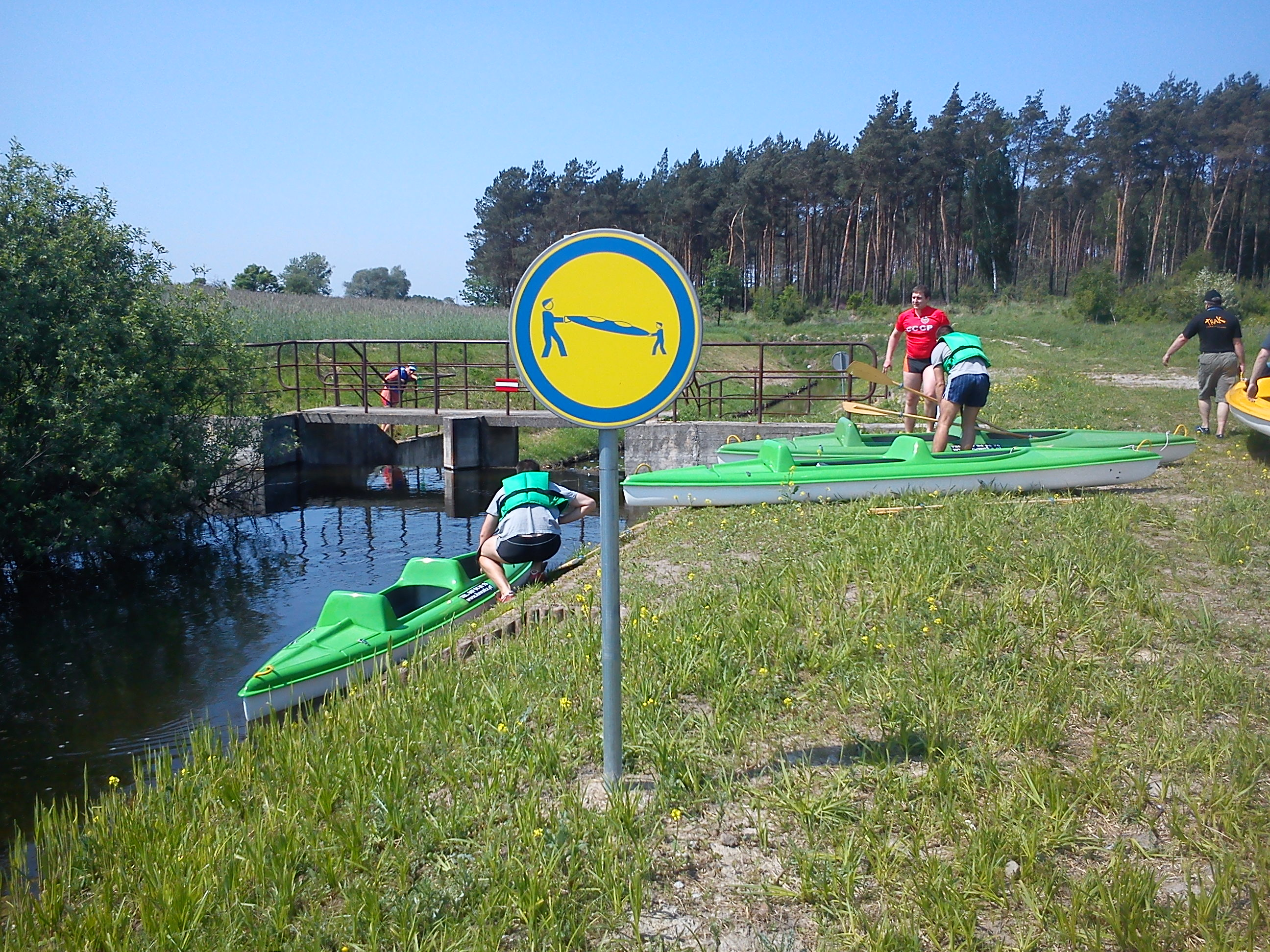 Szlak Kajakowy Puszcza Zielonka, przenoska w rejonie Pobiedzisk.